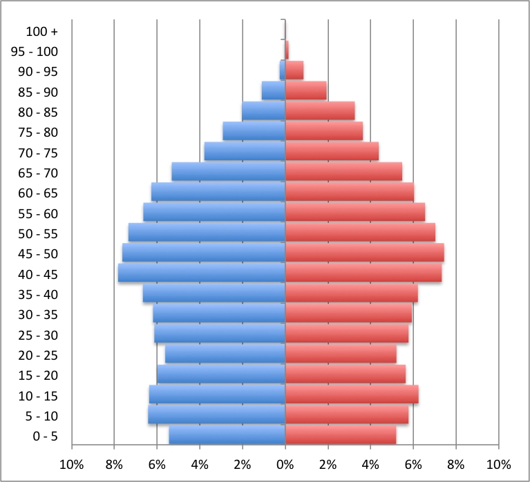 Bevolkingspiramide gemeente Hengelo 2013. Bron: Gemeente Hengelo (GBA) 2013